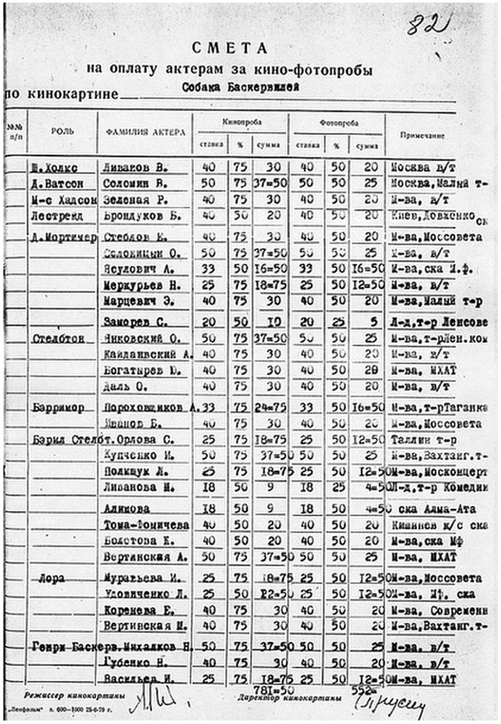 СМЕТА на оплату актёрам за кино-фотопробы по кинокартине Собака Баскервилей. Ленфильм, 1979 год: Ш.Холмс, Д.Ватсон, М-с Хадсон, Лестрейд - без вариантов. На роль "Д.Мортемера" (доктора Мортимера) - пробовались Олег Солоницын и др.; утверждён Евгений Стеблов. На роль "Стелбтона" (злодея Стэплтона) пробовались Александр Кайдановский, Олег Даль и Юрий Богатырёв; утверждён Олег Янковский. На роль Бэрримора (дворецкого) пробовались Александр Пороховщиков и Борис Иванов (был утверждён Александр Адабашьян). На роль "Бэрил Стелбт." (сестры-жены Степлтона) пробовались Любовь Полищук, Анастасия Вертинская, жена Василия Ливанова; утверждена Ирина Купченко. На роль Лоры (миссис Лайонс) пробовались Ирина Муравьёва, Лариса Удовиченко, Елена Коренева (была утверждена Алла Демидова). На роль сэра Генри Баскервиля пробовались Николай Губенко и Игорь Васильев; утверждён Никита Михалков.